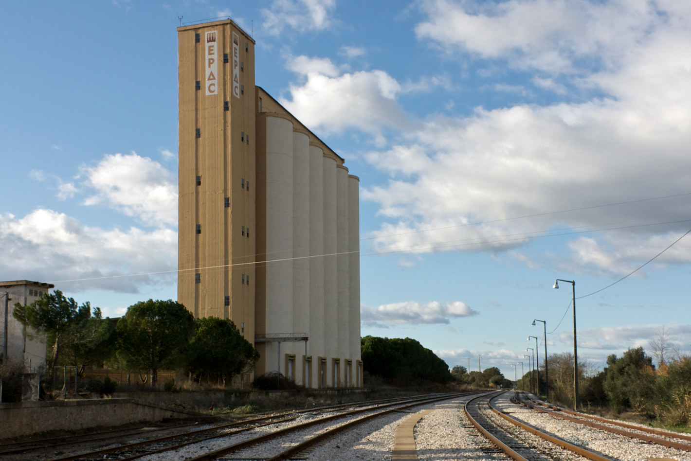 sentido Abrantes. Tipo: E [Estação] Local: Portalegre-Gare [Linha do Leste, PK 216 • Linha de Évora, PK 239] Data e hora: 9 de Dezembro de 2008 [15h40]